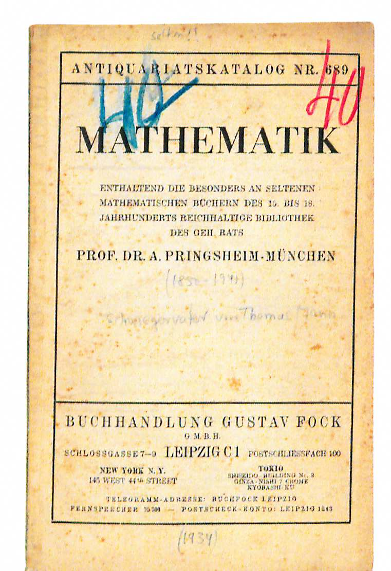 Gustav Fock GmbH Versteigerung der von Alfred Pringsheim bei seiner Emigration aus dem Deutschen Reich zurückgelassenen mathematischen Fachbibliothek mit 3.353 Titeln